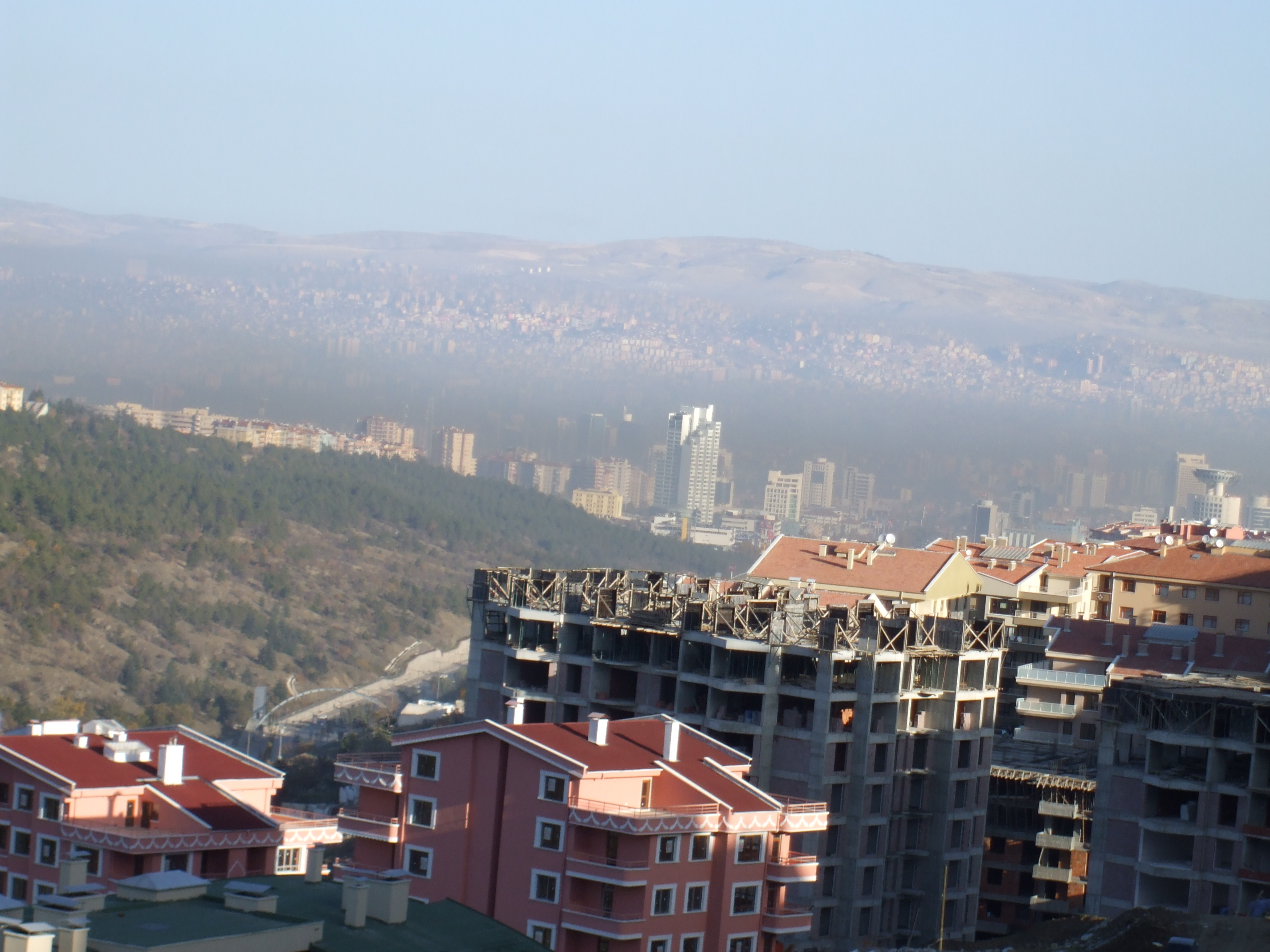 Air Pullation in Ankara